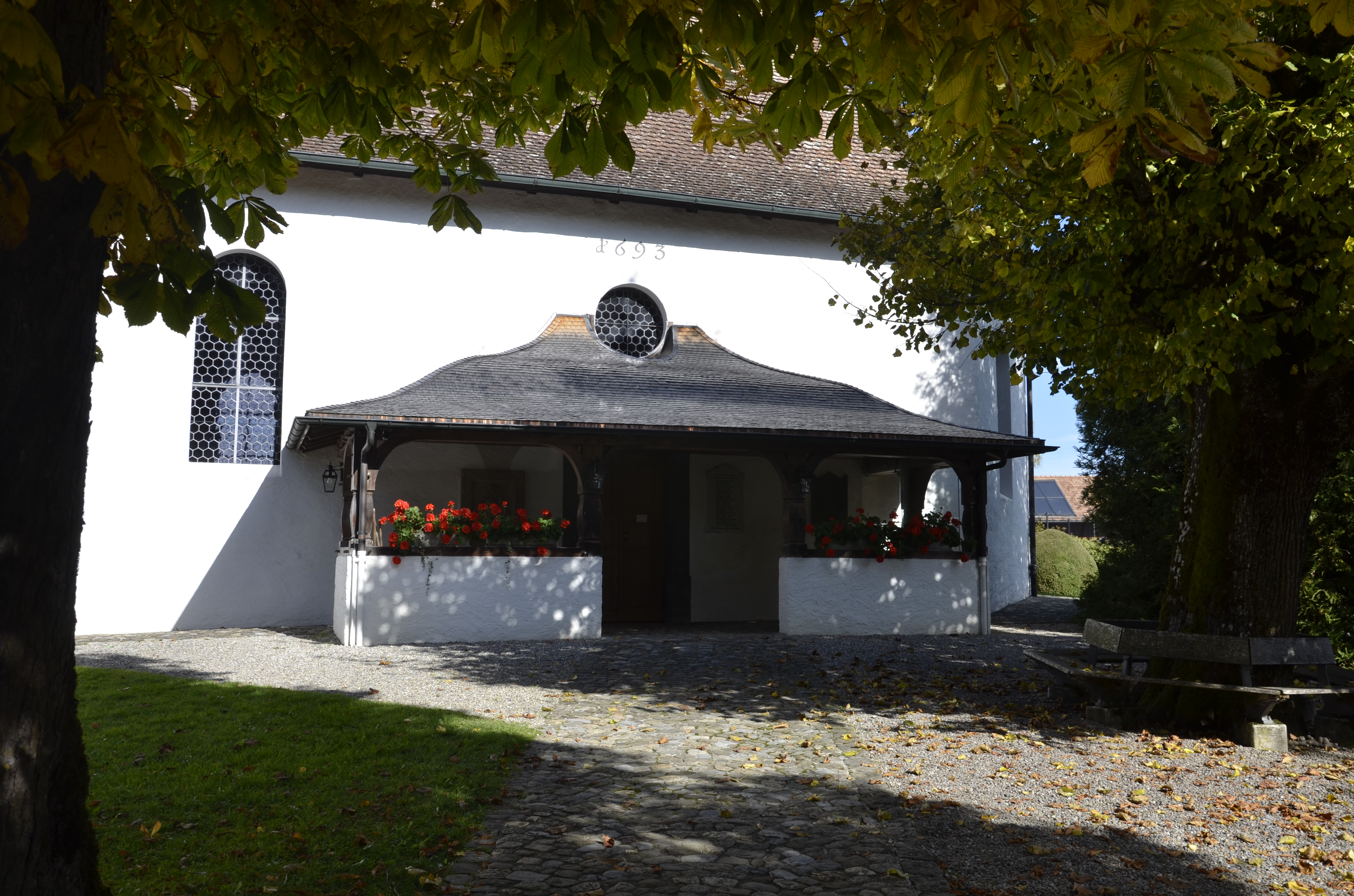 Kanton Bern (Schweiz): Kirche Schwarzenegg Eingang